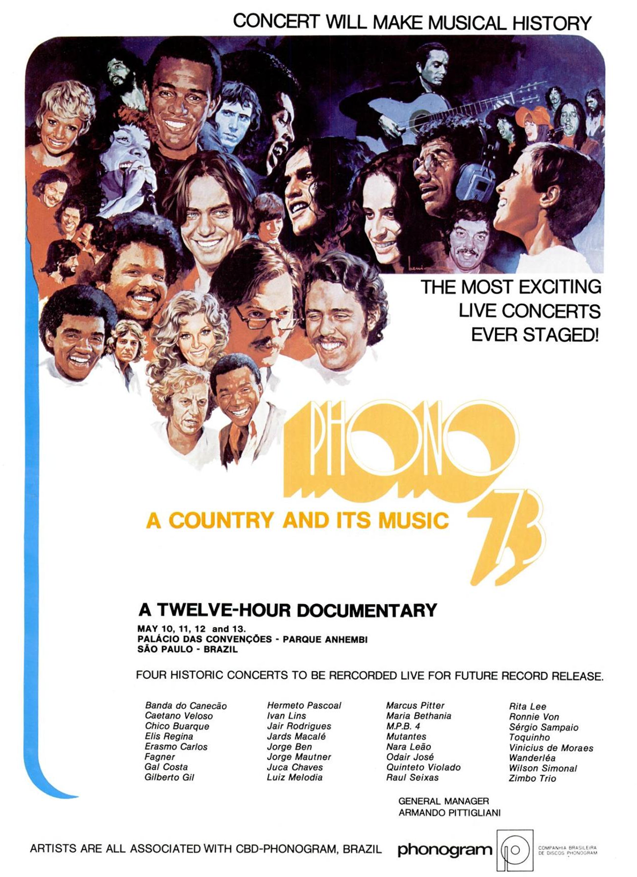 Trade ad for brazilian music festival Phono 73.